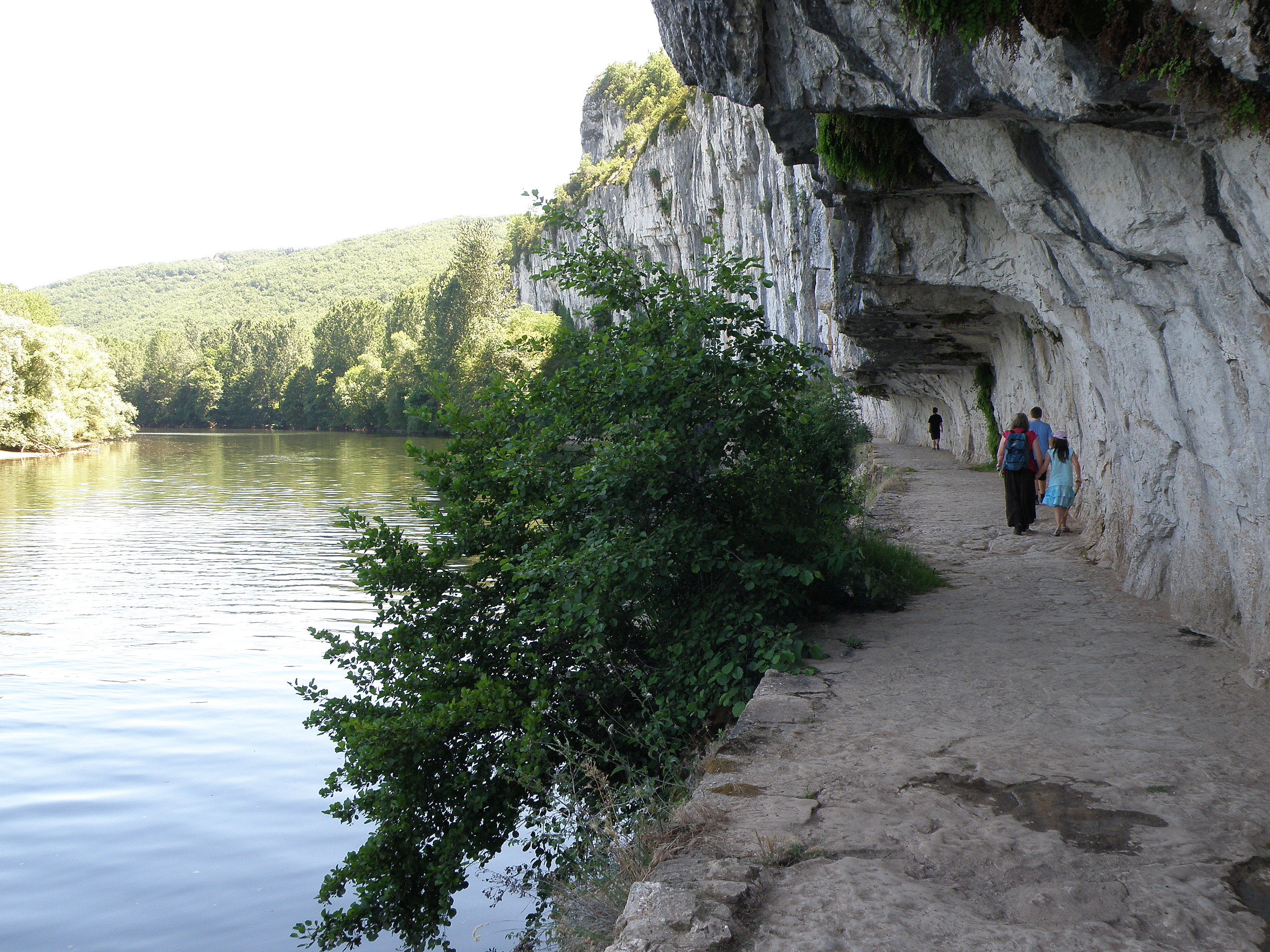 Bouziès, commune et village du département du Lot (région Midi-Pyrénées, France), situés sur le Lot à une quinzaine de km (à vol d’oiseau) à l’est, et donc en amont, de Cahors. Chemin de halage, sur la rive gauche du Lot, à un km environ en amont du village, non loin de l'écluse du Ganil (comm. de Saint-Cirq-Lapopie).